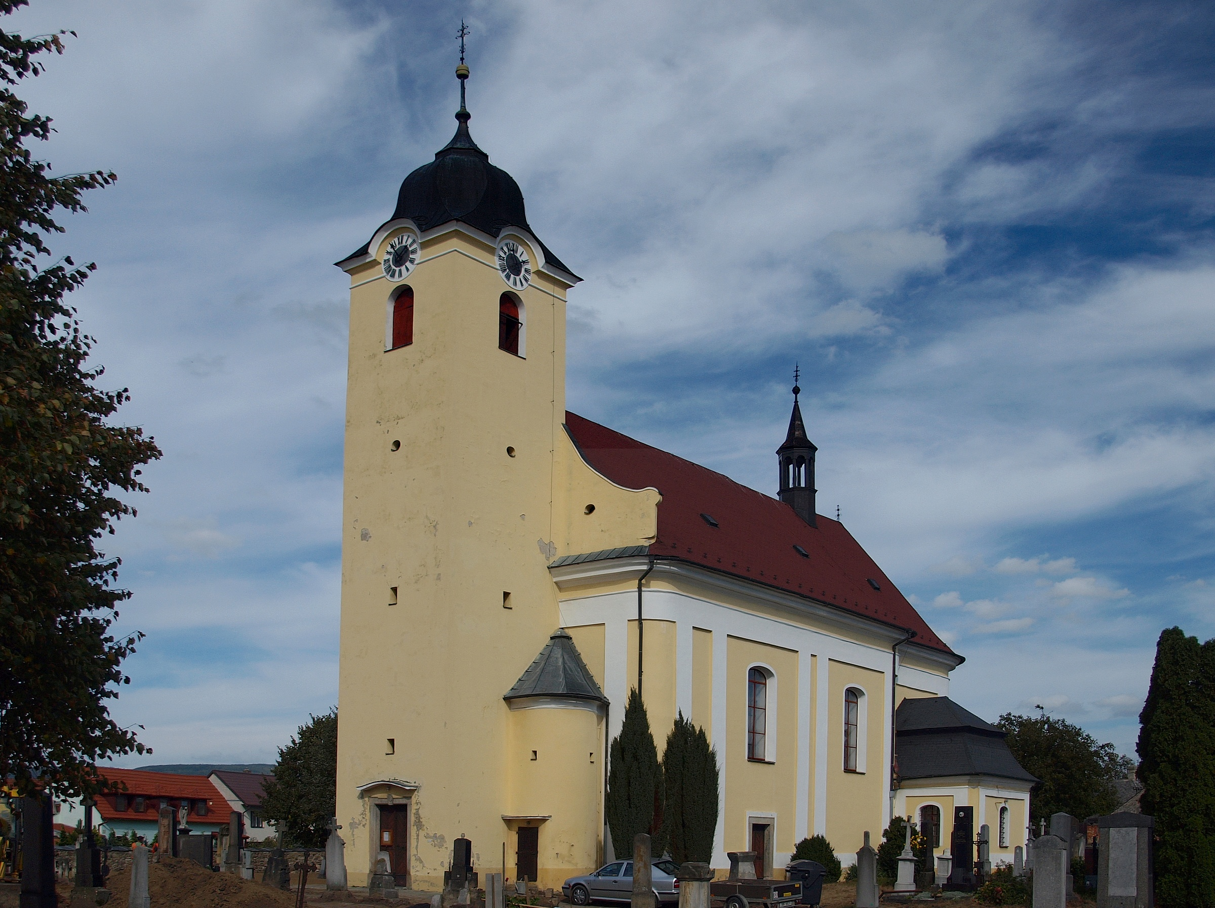 Kostel Povýšení sv. Kříže (Osek nad Bečvou), náves, Osek nad Bečvou